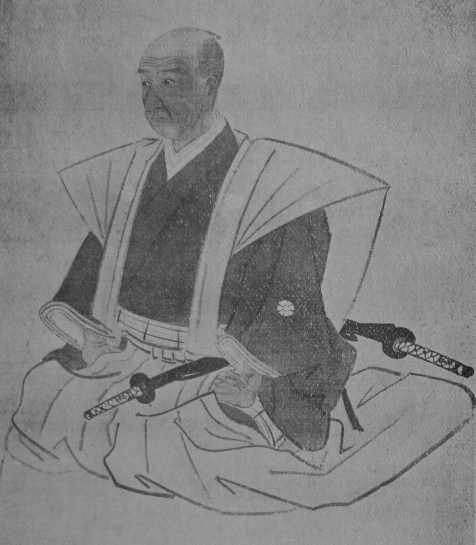 金易右衛門の肖像画